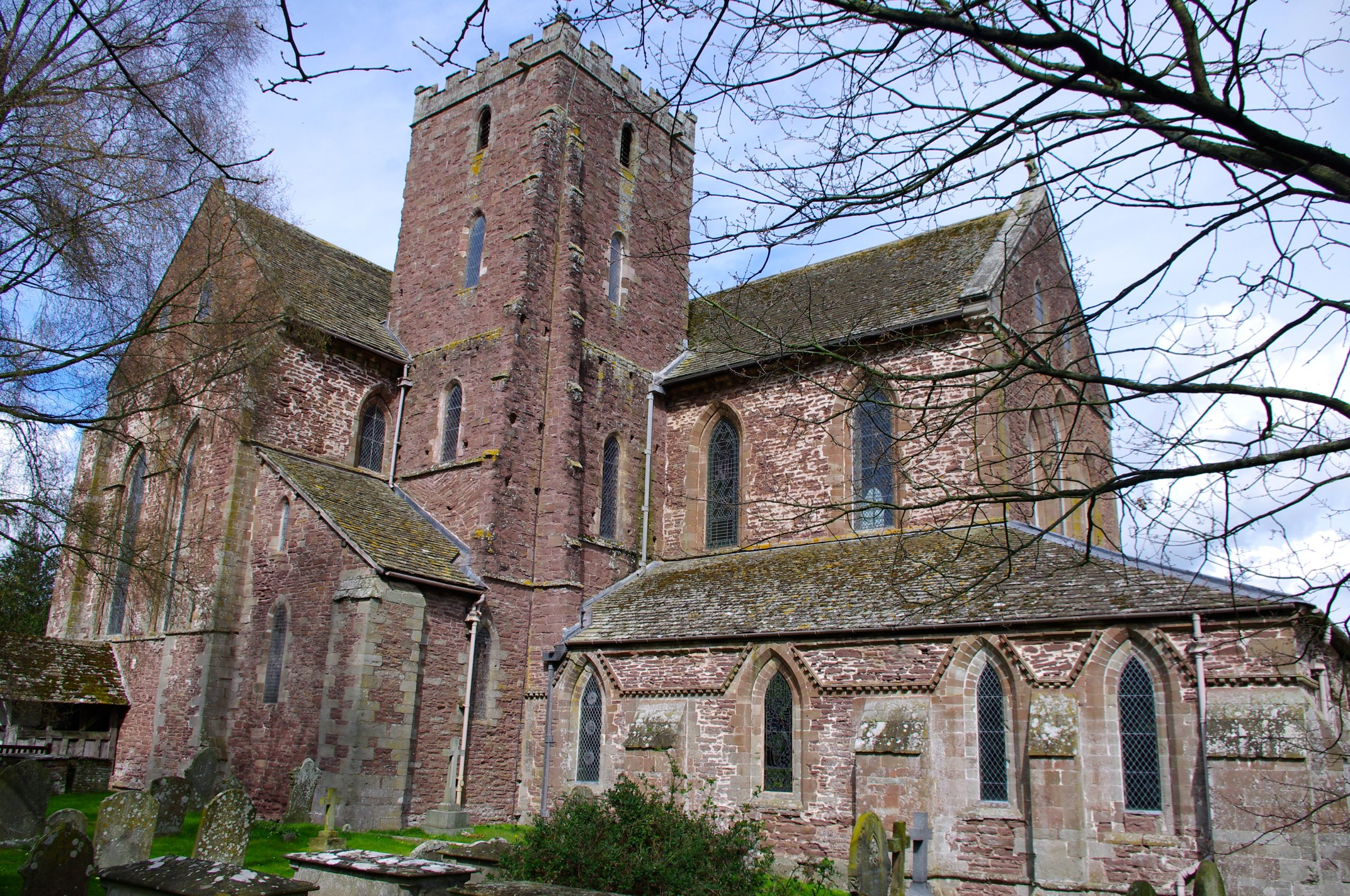 Dore Abbey, Herefordshire